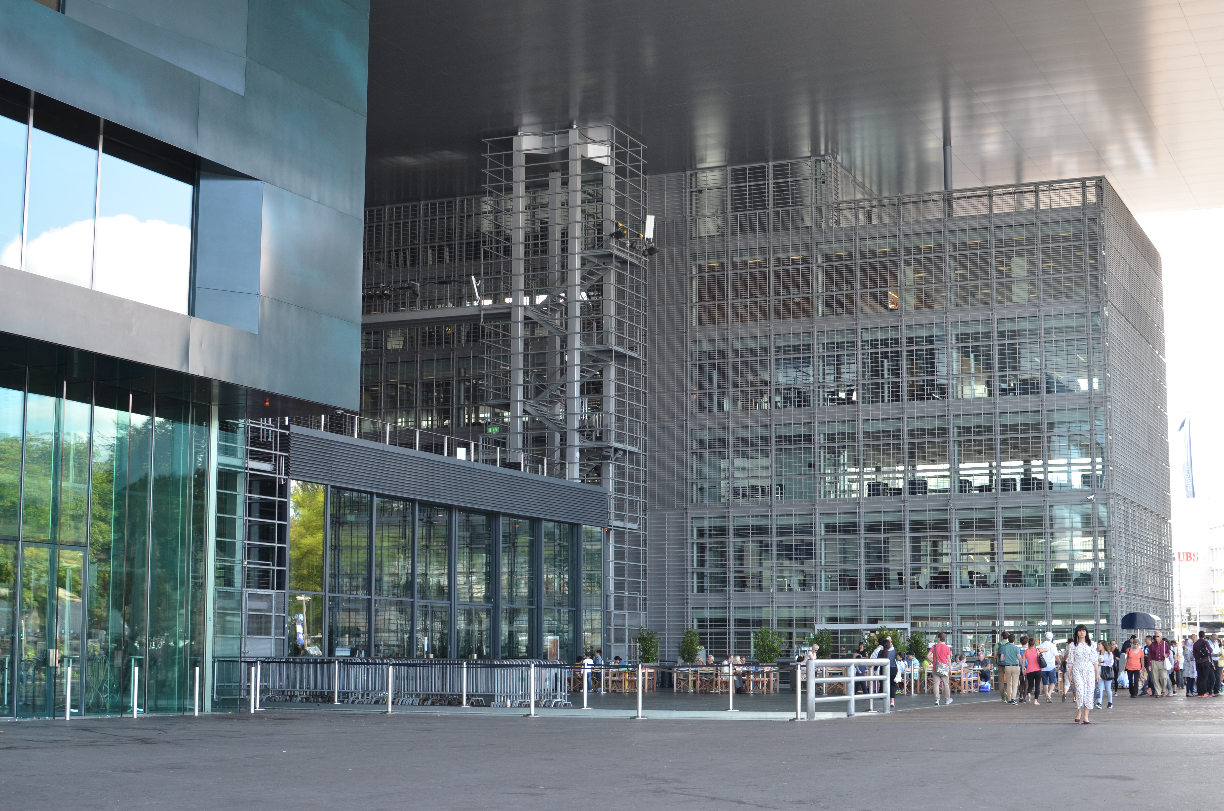 Het Kultur- und Kongresszentrum Luzern anno 2015.